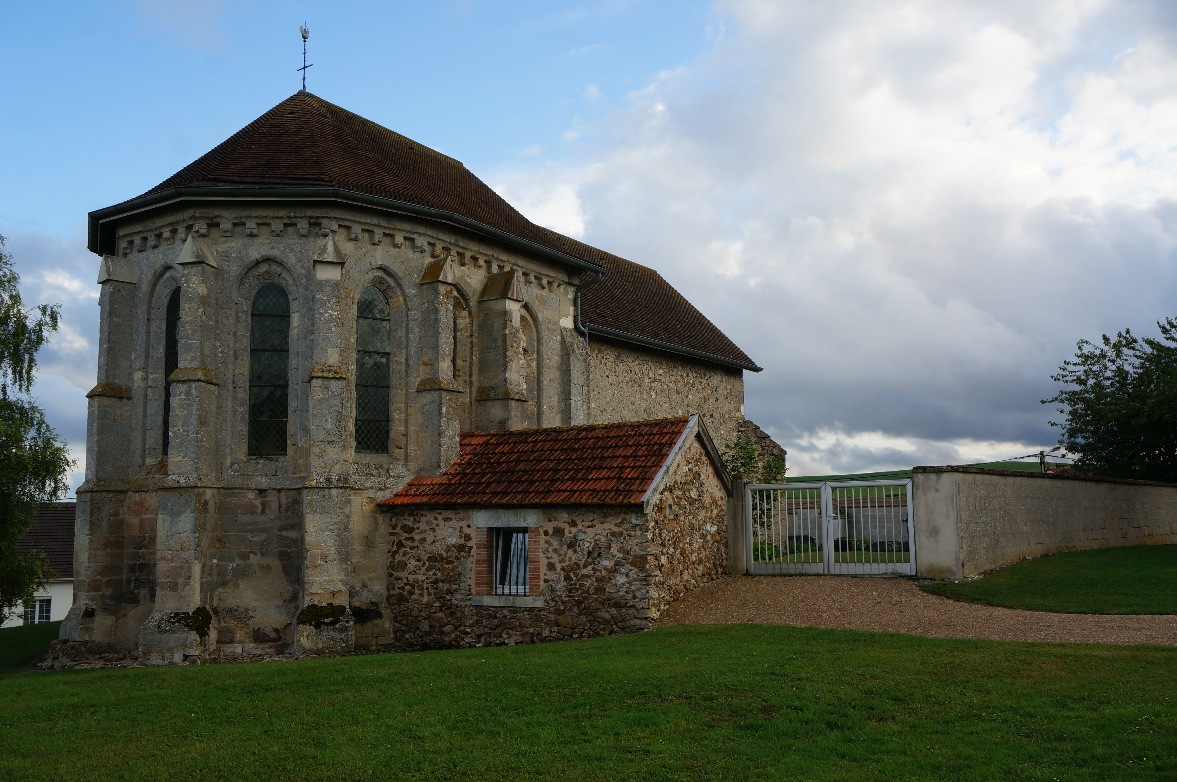 l'église du village.